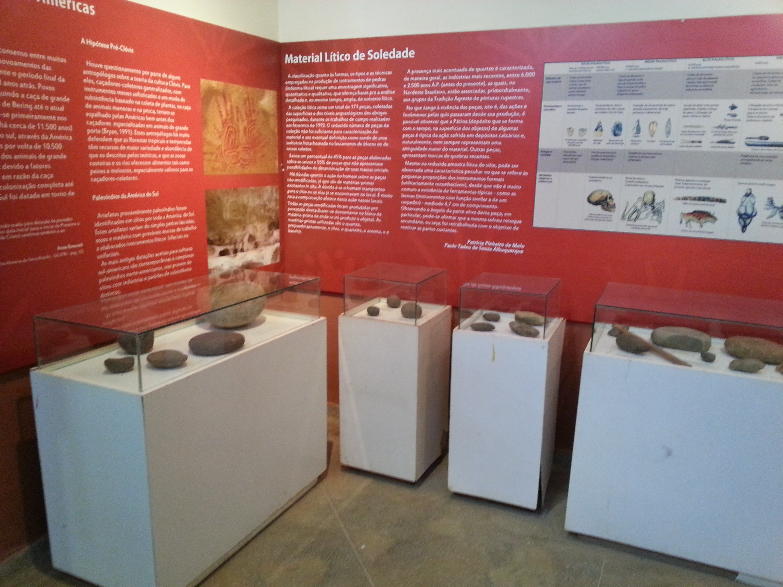 Objetos expostos no Museu do Lajedo de Soledade